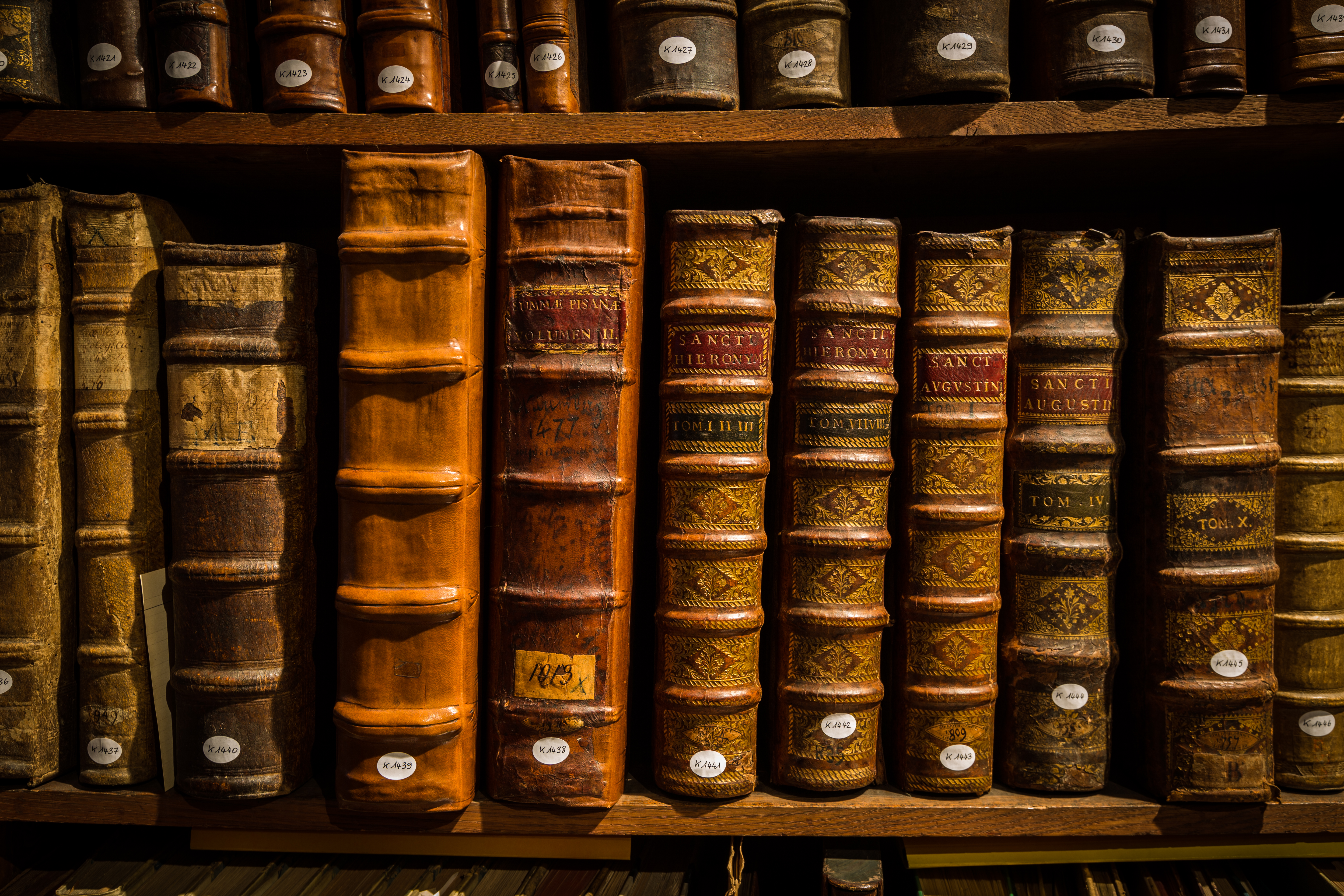 Bibliothèque humaniste de Sélestat 21 janvier 2014. Descriptions à venir